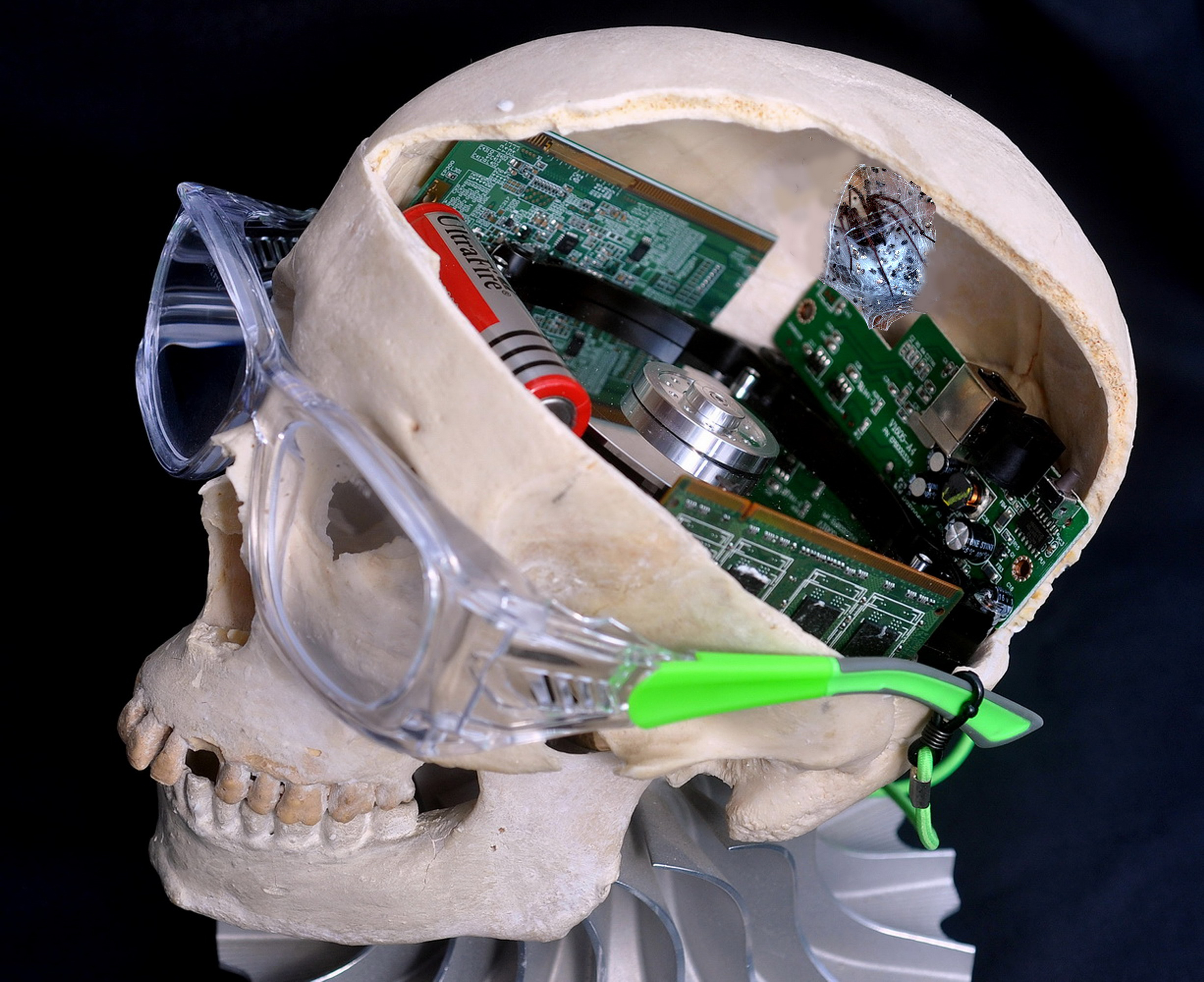 mémoire morte